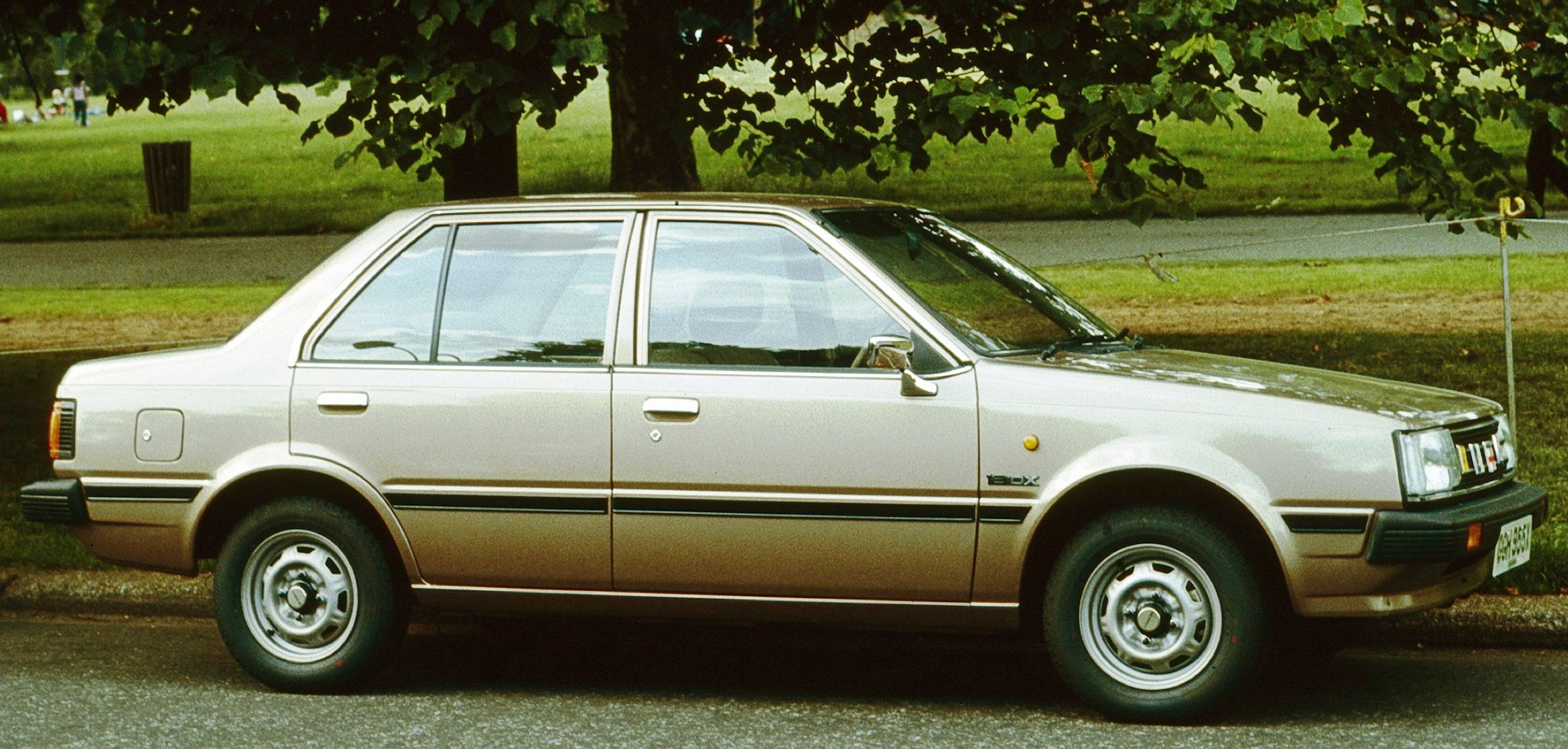 Nussan Sunny Sedan 1982 UK